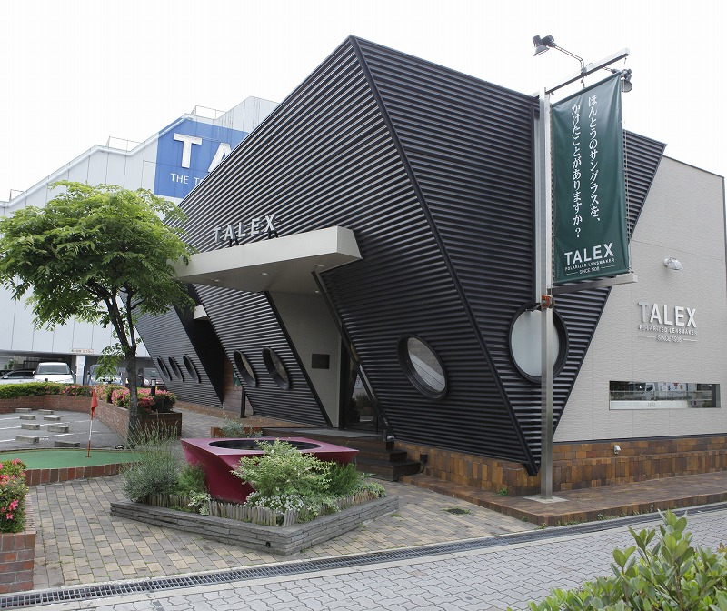 SHOWROOM